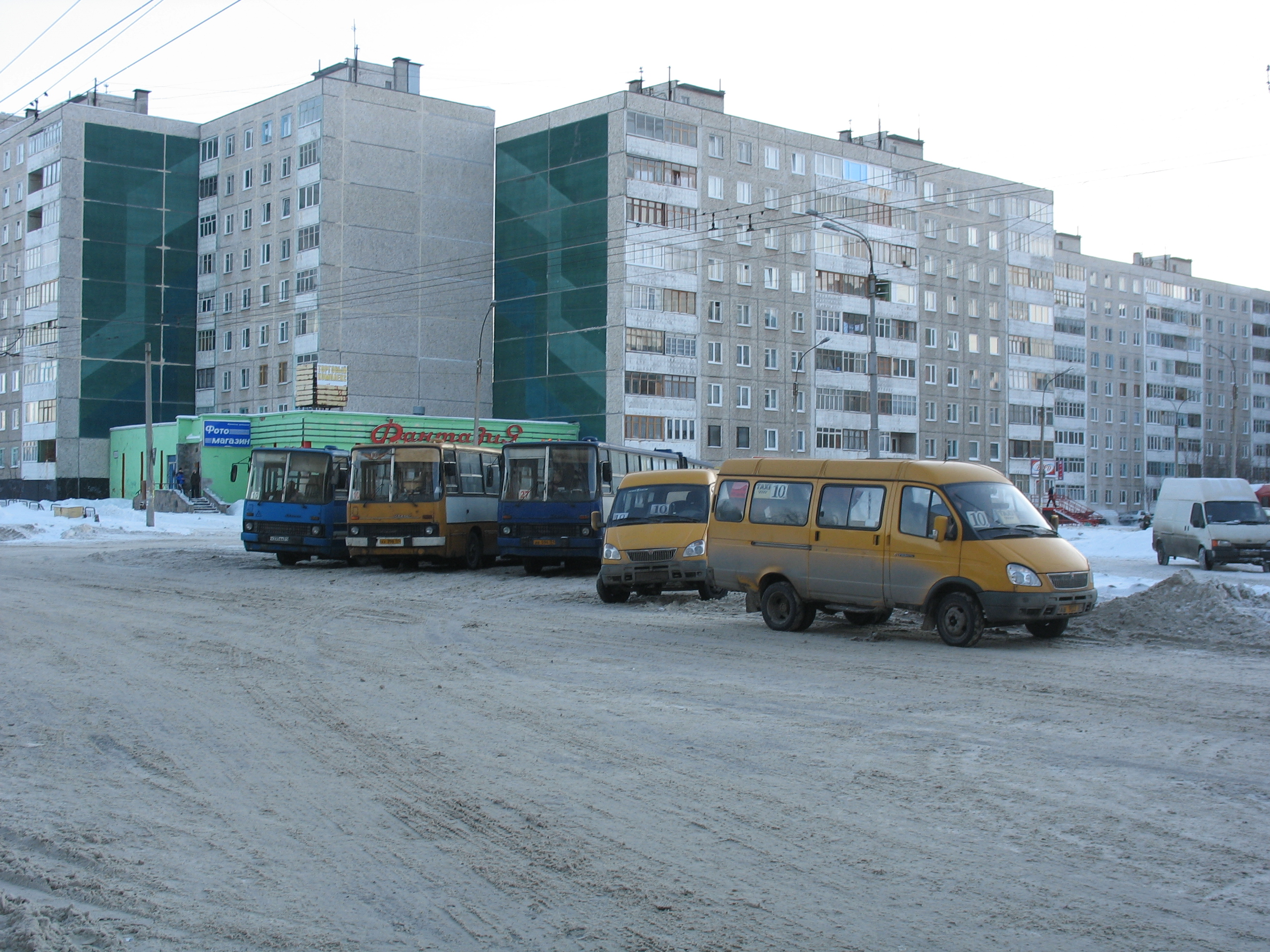 Мурманск. Конечная автобусного маршрута №10